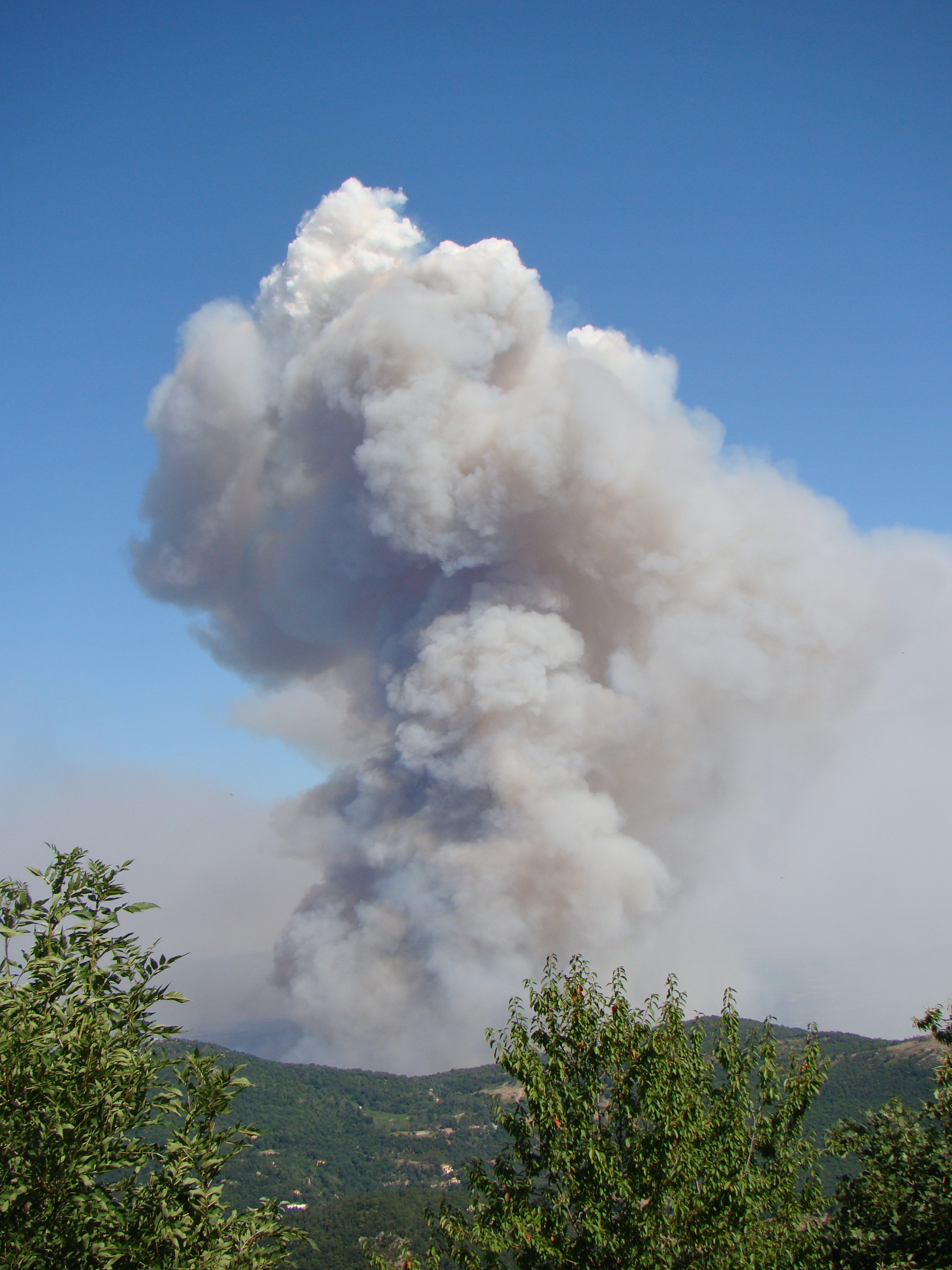 Incendie du 23 juillet 2012 à La Jonquera depuis les Salines